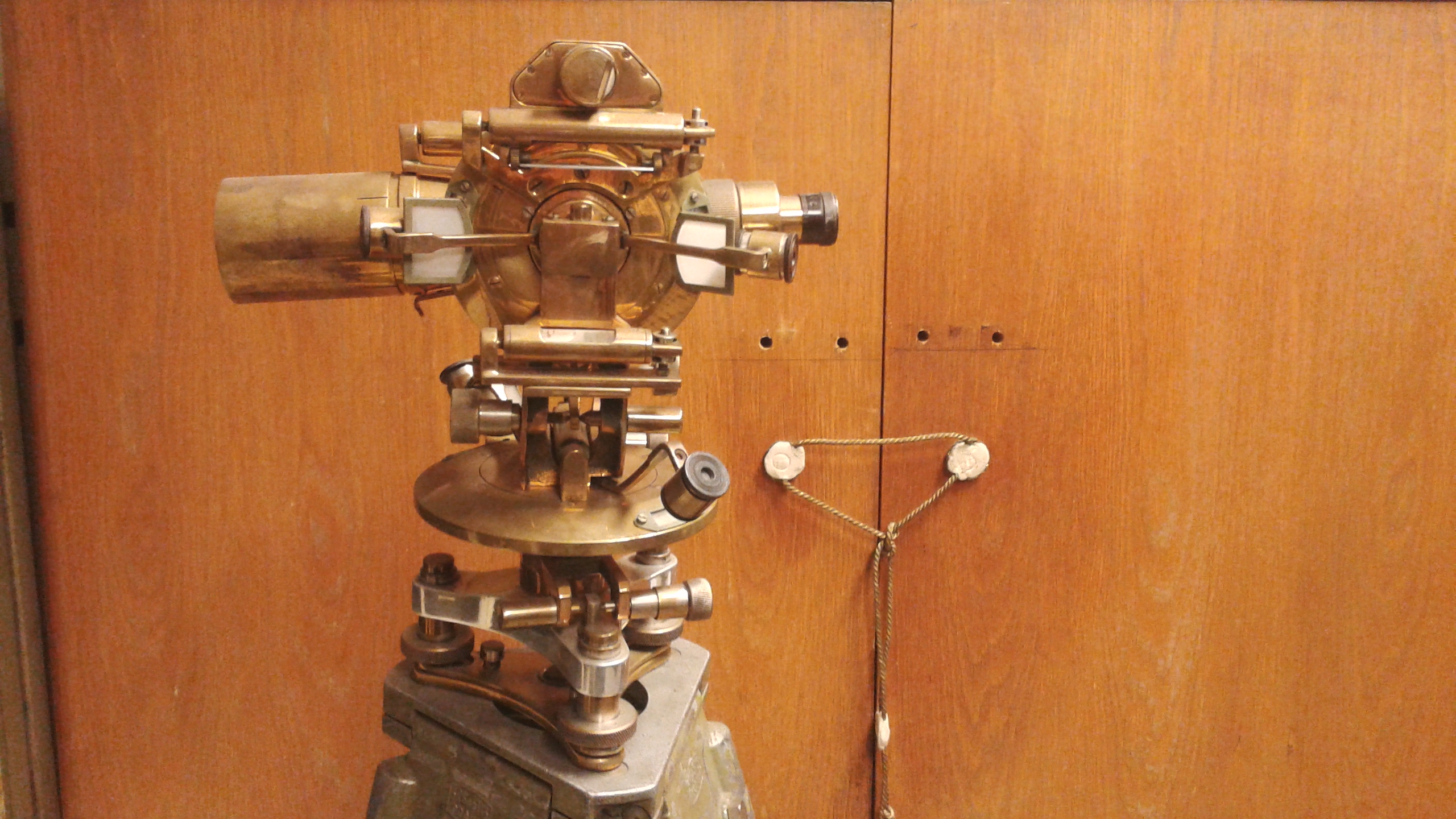 Teodolit Srb a Štys na Dole Michal NKP Ostrava-Michálkovice. Vzhled teodolitu na obrázku ale není autentický, výrobky firmy měly z výroby povrch smaltu v barvě khaki.